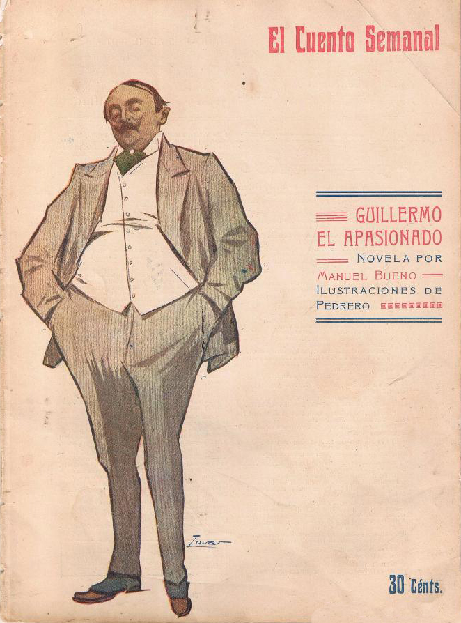 Guillermo el Apasionado, novela de Manuel Bueno, ilustraciones de Pedrero.